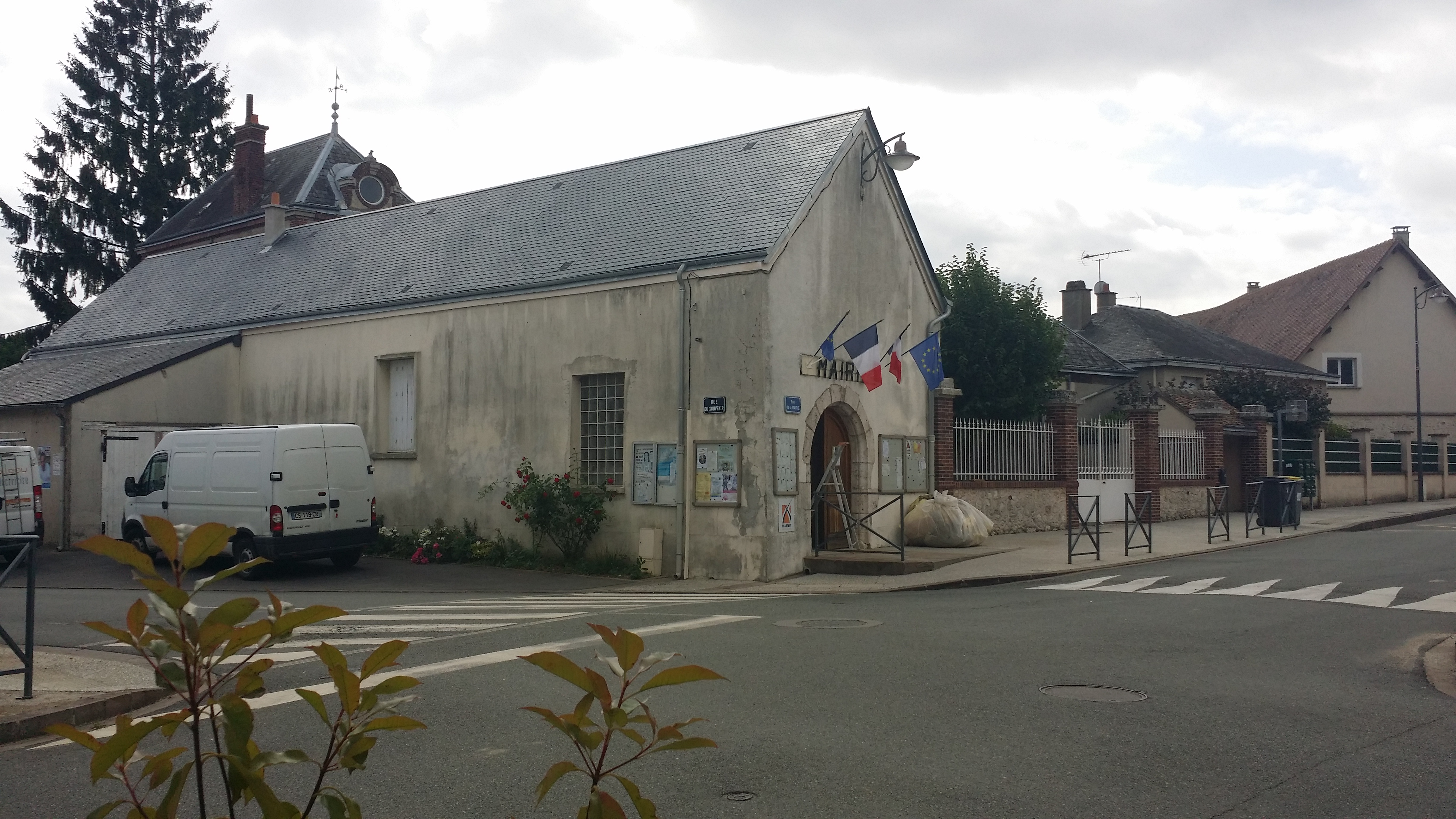 Mairie